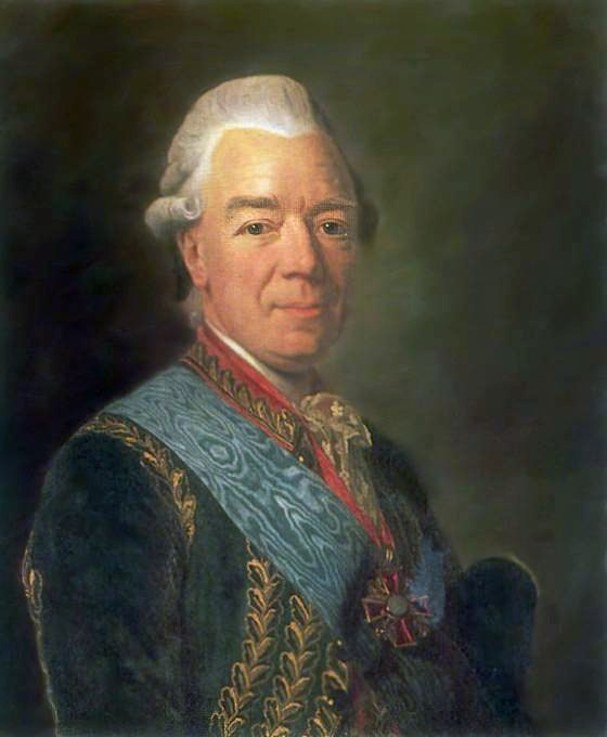 «Портрет графа Чернышёва»